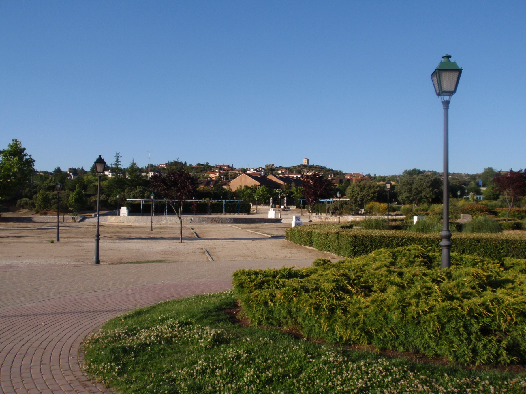 Torrelodones. Parque Pradogrande.